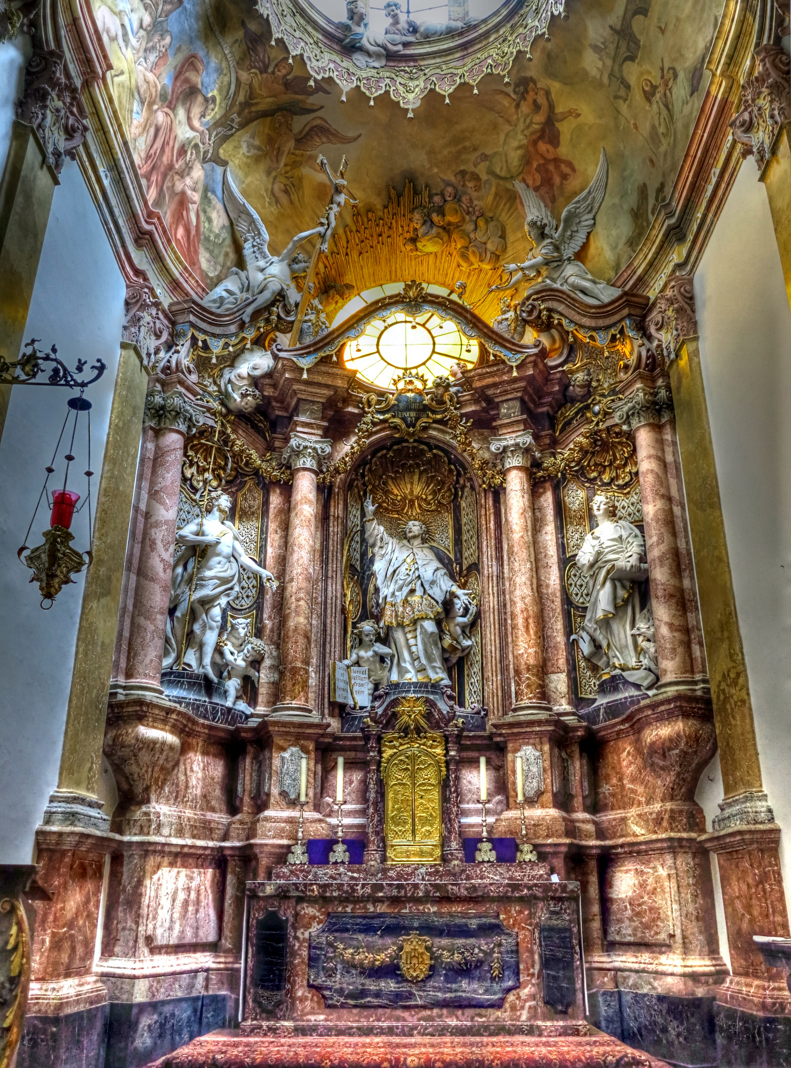 Deutschland, Bayern, Regierungsbezirk Oberbayern, Freising, Freisinger Dom, Seitenaltar I in der südliche Seitenschiffsapsis, genannt: Johann-Nepomuk-Kapelle gestaltet 1737/38 von Egid Quirin Asam im italienischen Spät- bzw. Hochbarock; die drei Altar-Stuckfiguren stellen die drei Heiligen Johannes dar, deshalb auch Johanni-Kapelle